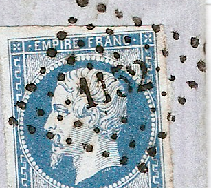 Détail du Fragment de lettre de France (Dunkerque) affranchie avec un 20 c bleu de 1854 et oblitérée par un cachet petits chiffres 1152.